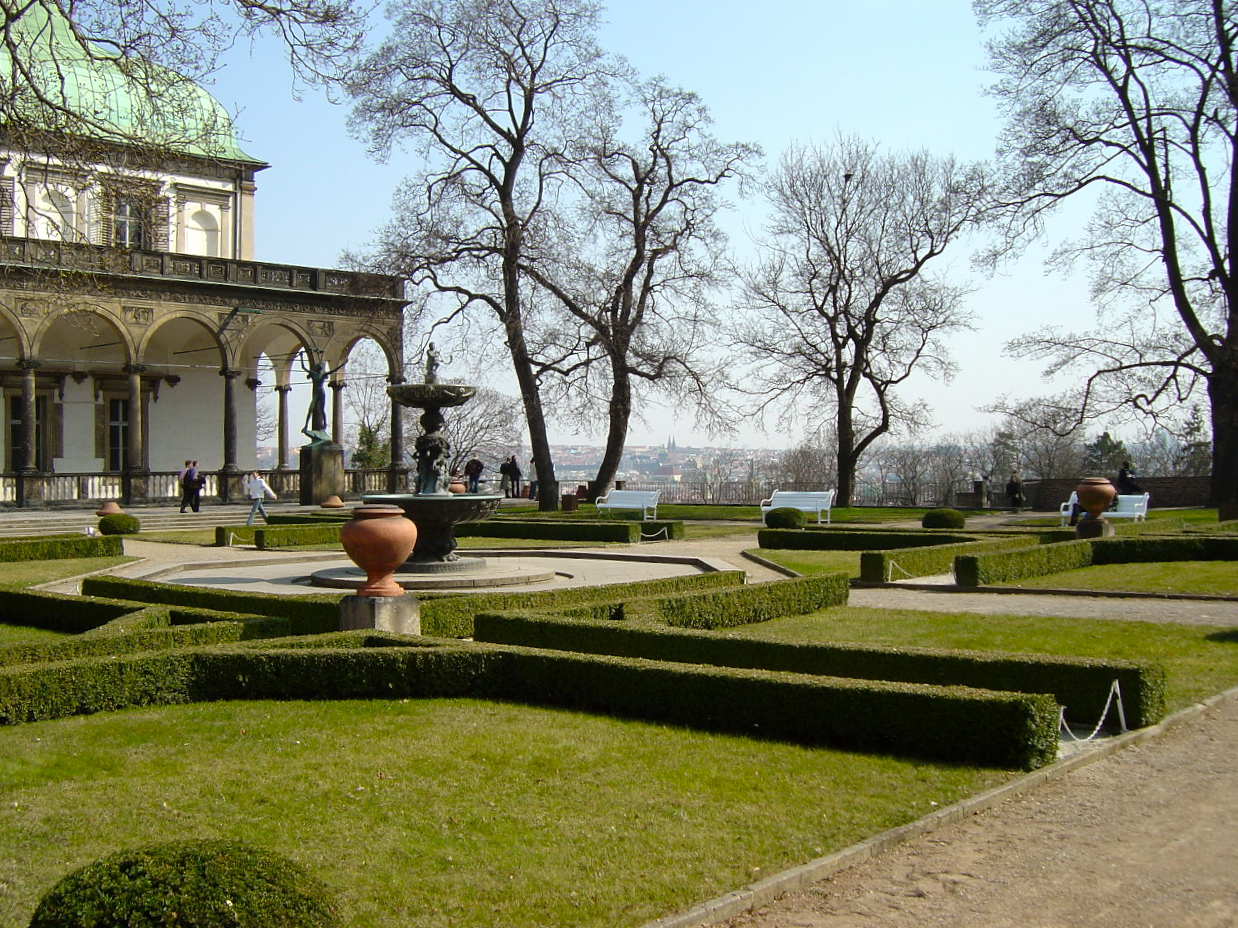 Prague